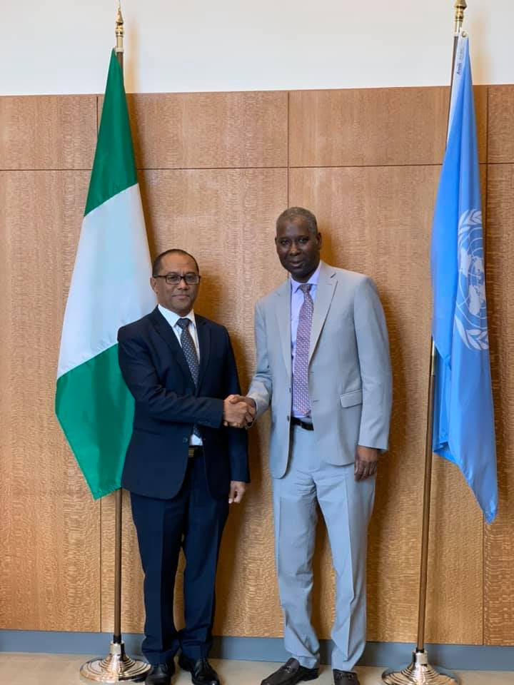 Dionísio Babo Soares trifft Tijjani Muhammad Bande